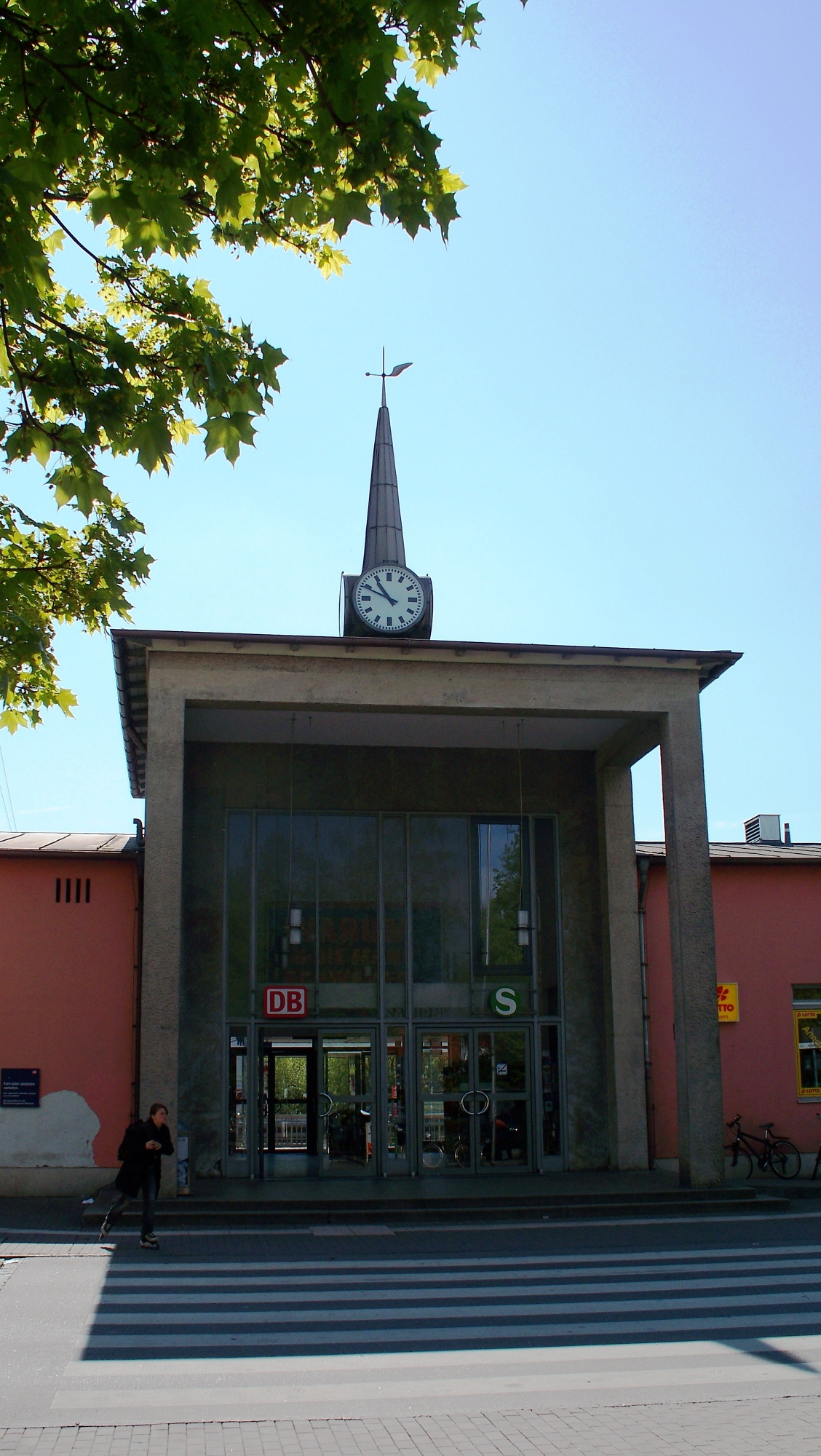 Der Eingangsbereich des Bahnhofs Freising.